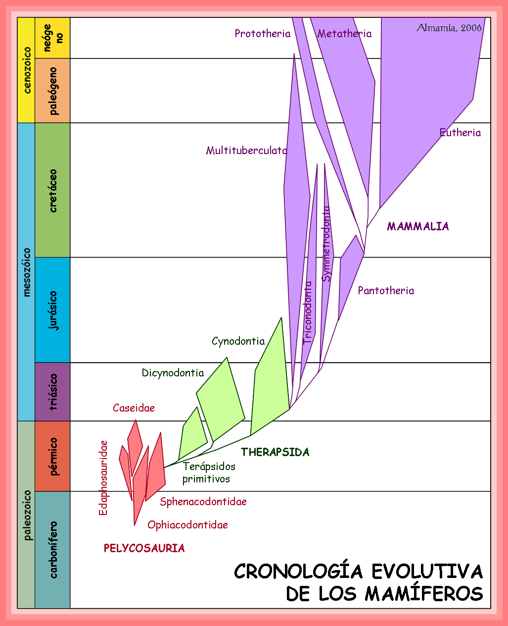 Cronología de la evolución de los mamíferos. Mammals evolution: cronology